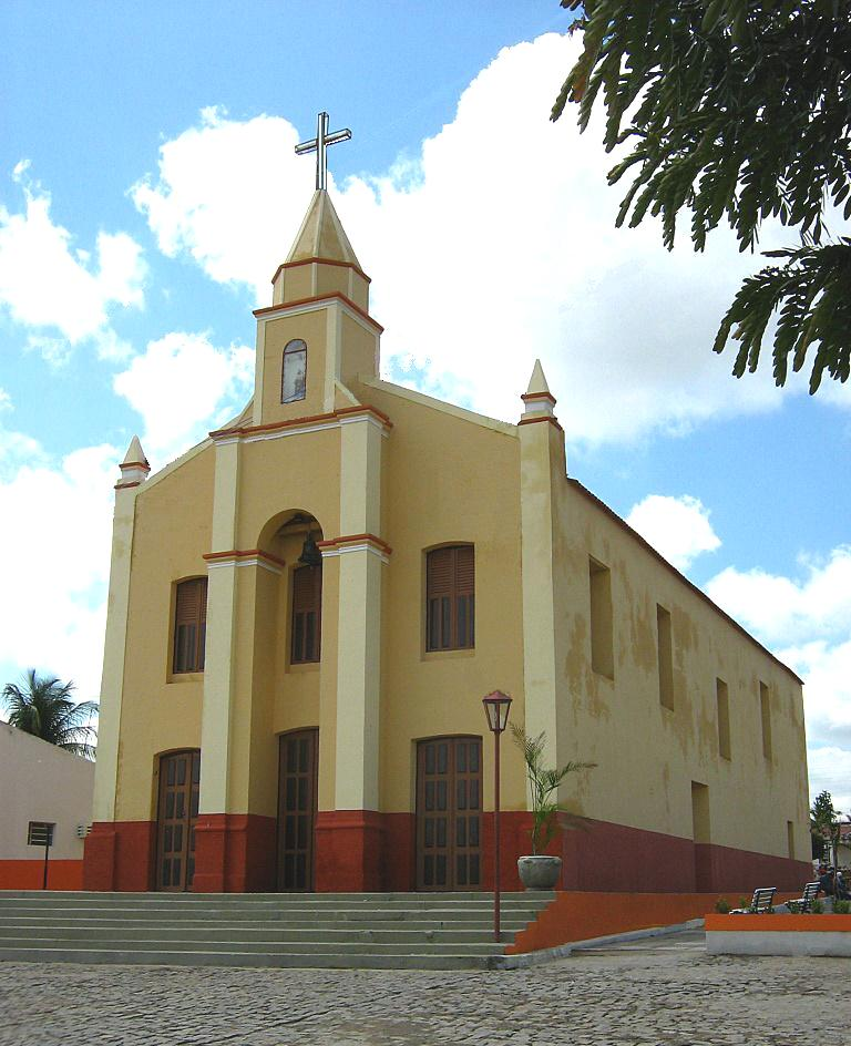 Igreja Matriz de São José da Ingazeira